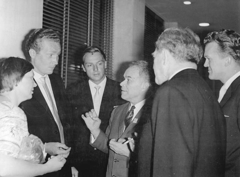 Moskau, Aufführung "Nackt unter Wölfen", Gespräch Zentralbild-Eckleben 16.7.1963 Moskau III. Internationales Filmfestival (7.- 21. Juli 1963) Aufführung des Films "Nackt unter Wölfen" Mit starkem Beifall wurde am 15. Juli im Kongreßpalast des Kremls der Wettbewerbsbeitrag der DDR zu den Moskauer Filmfestspielen "Nackt unter Wölfen" aufgenommen. UBz: Nach der Vorstellung beglückwünscht der bekannte sowjetische Regisseur Mark Donskoi die Künstler aus der DDR. Von links: Frau Donskoi, Regisseur Frank Beyer, Kameramann Günter Marczinkowsky, Mark Donskoi, Joachim Mückenberger und Professor Hans Rodenberg, Stellvertreter des Ministers für Kultur der DDR (im Vordergrund) Abgebildete Personen: Beyer, Frank: Regisseur, DDR (GND 119217899) Donskoi, Mark: Filmregisseur, Sowjetunion Rodenberg, Hans Prof.: Intendant Theater der Freundschaft, Direktor DEFA-Filmstudio, DDR Marczinkowsky, Günter: Kameramann bei der DEFA, DDR